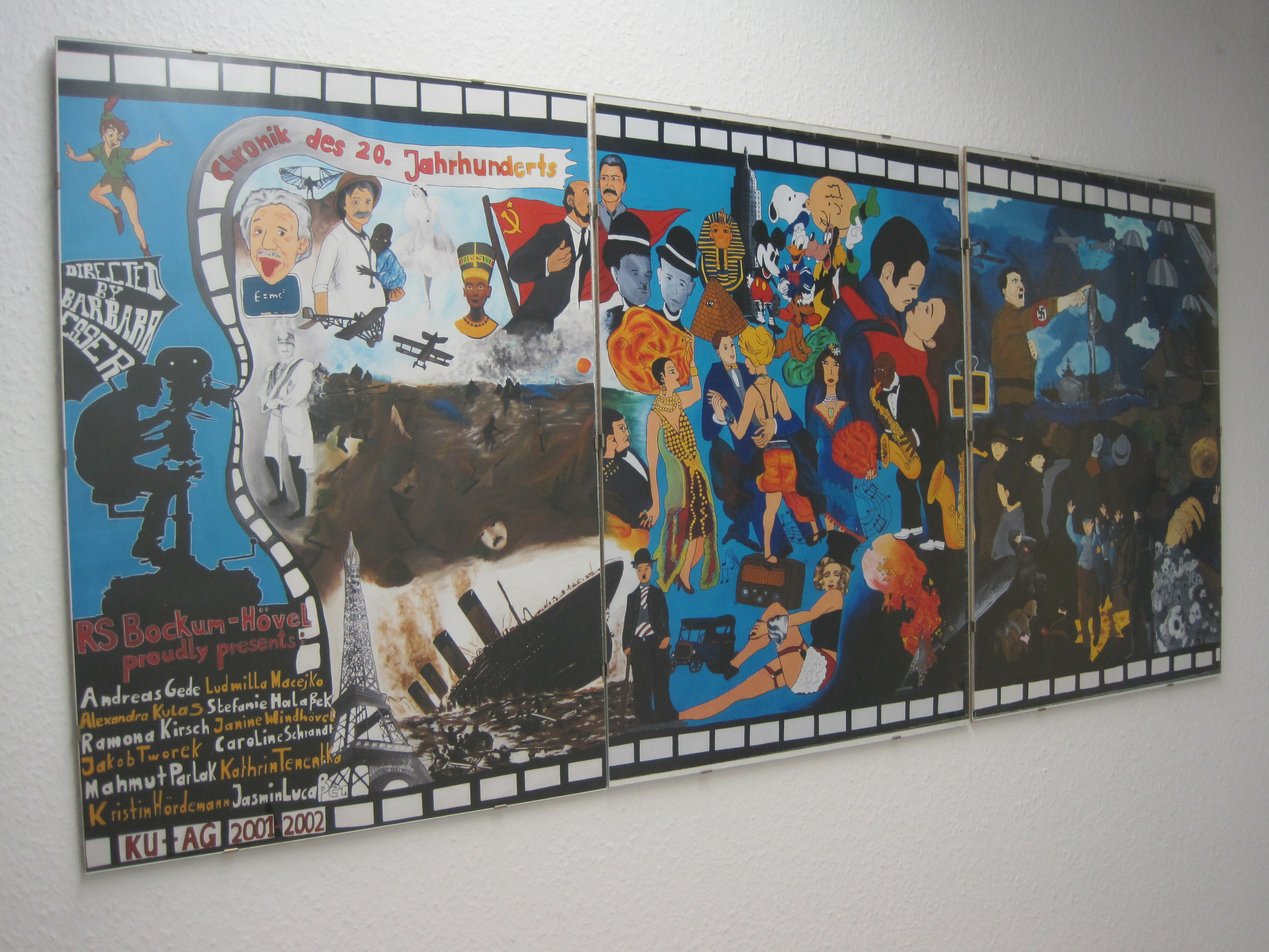 Das Foto zeigt ein Bild im Rathaus Bockum-Hövel.